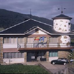 Ayutamiento de Coaña